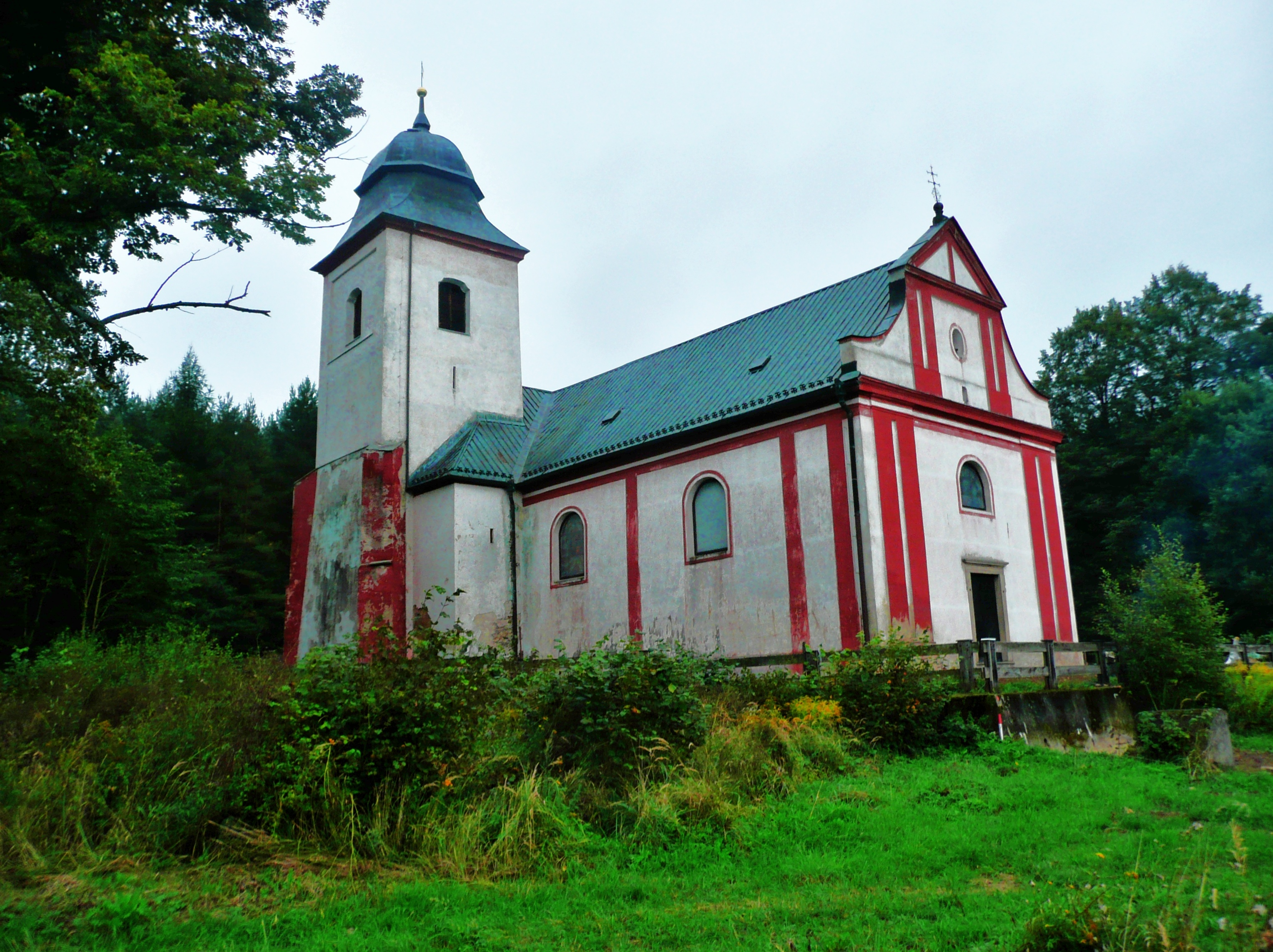 Kostel sv. Víta (Zahrádka), náves, Zahrádka